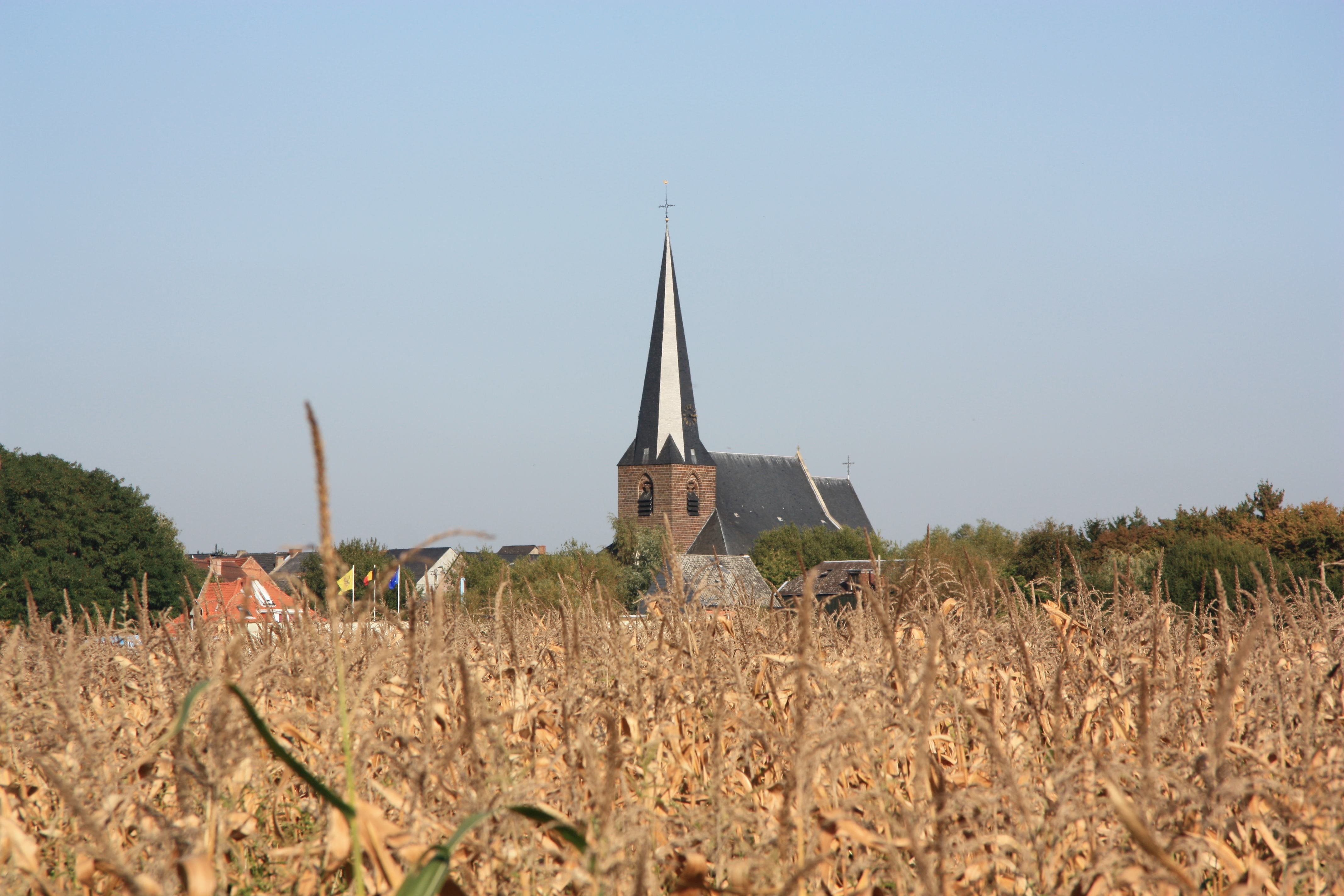 Parochiekerk Sint-Laurentius